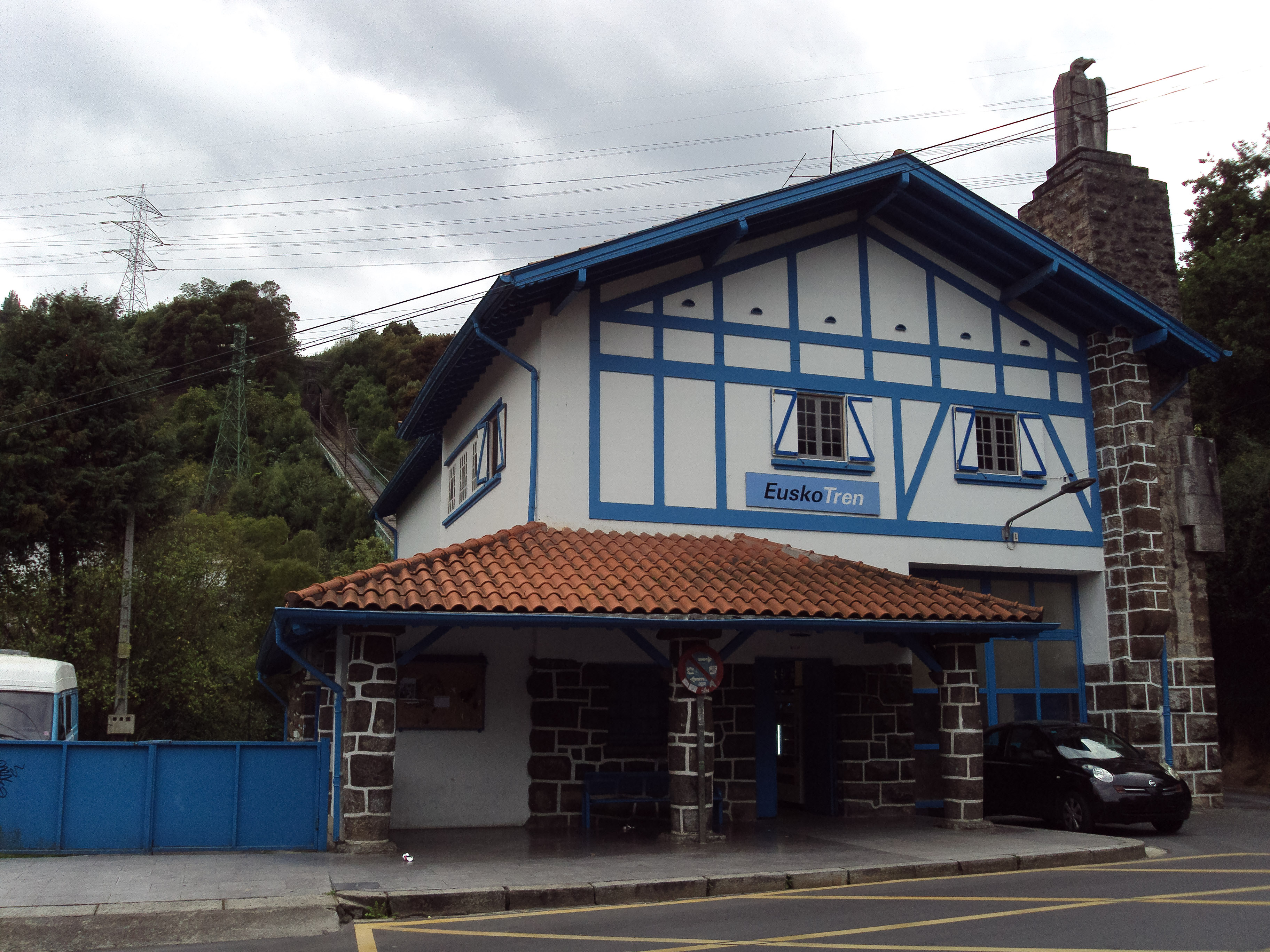 La Escontrillako beheko geltokia